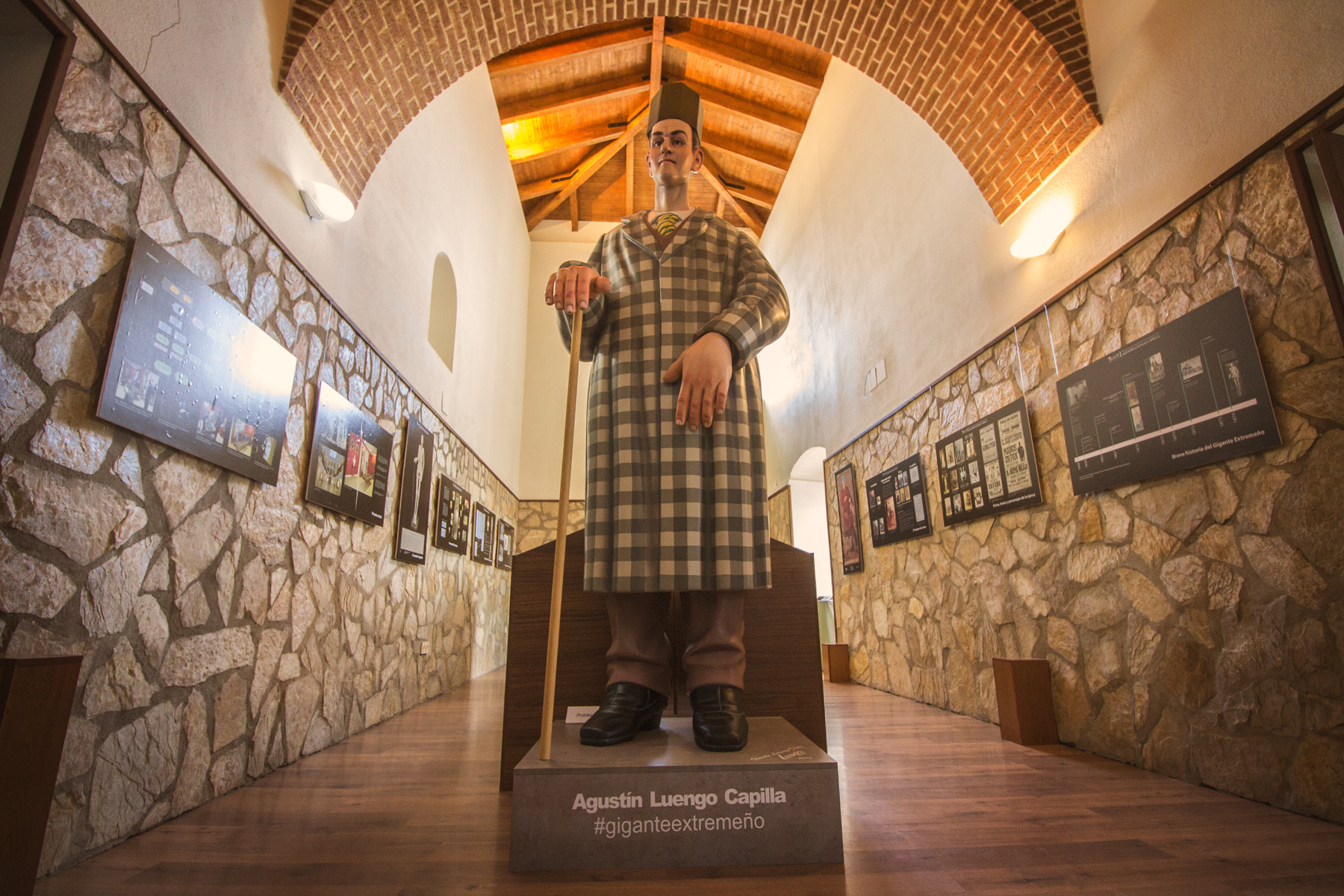 Vista de la sala central de museo, estatua de Agustín Luengo Capilla.